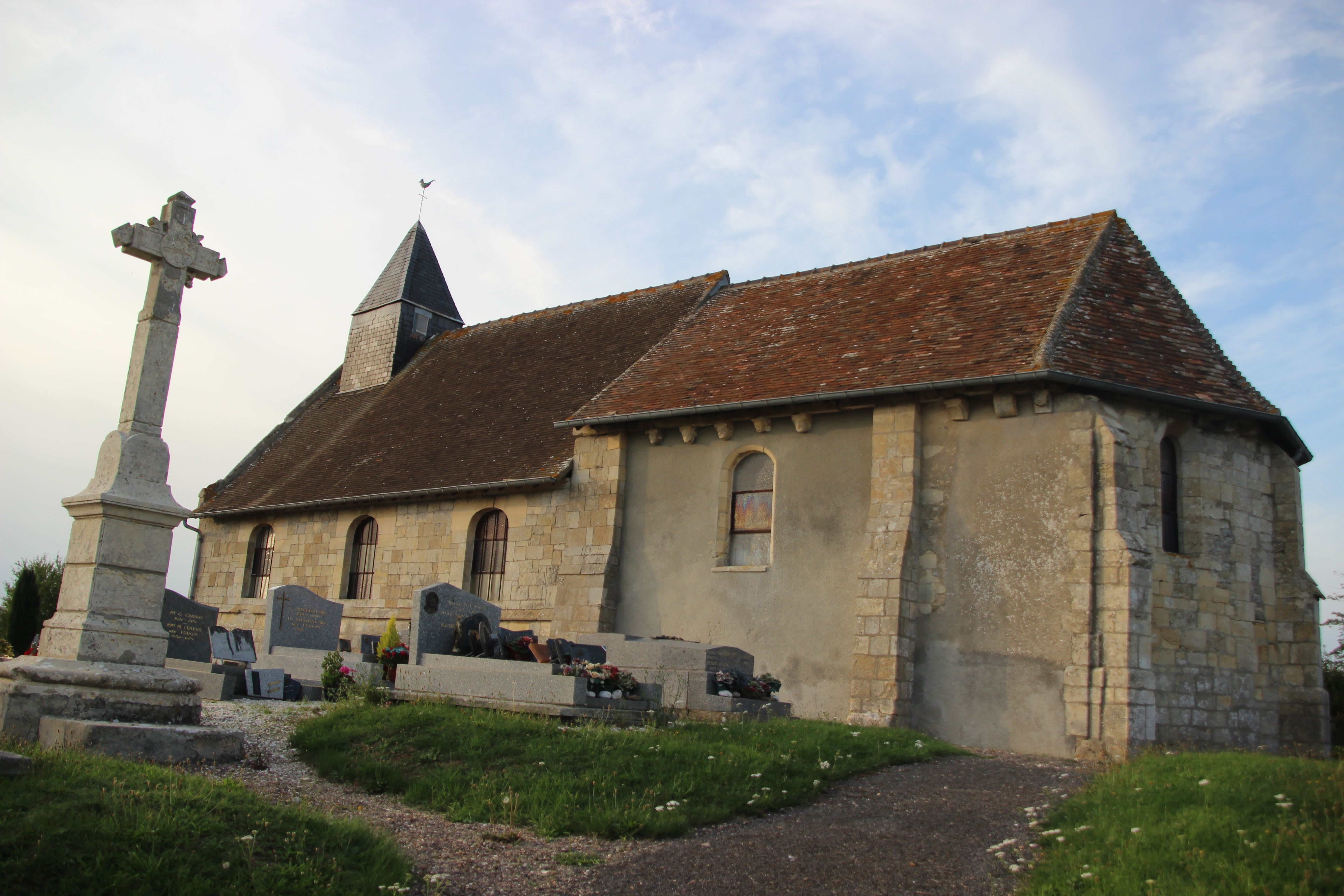 église de Périers en Auge (#100wikicommonsdays session 2 jour 36)